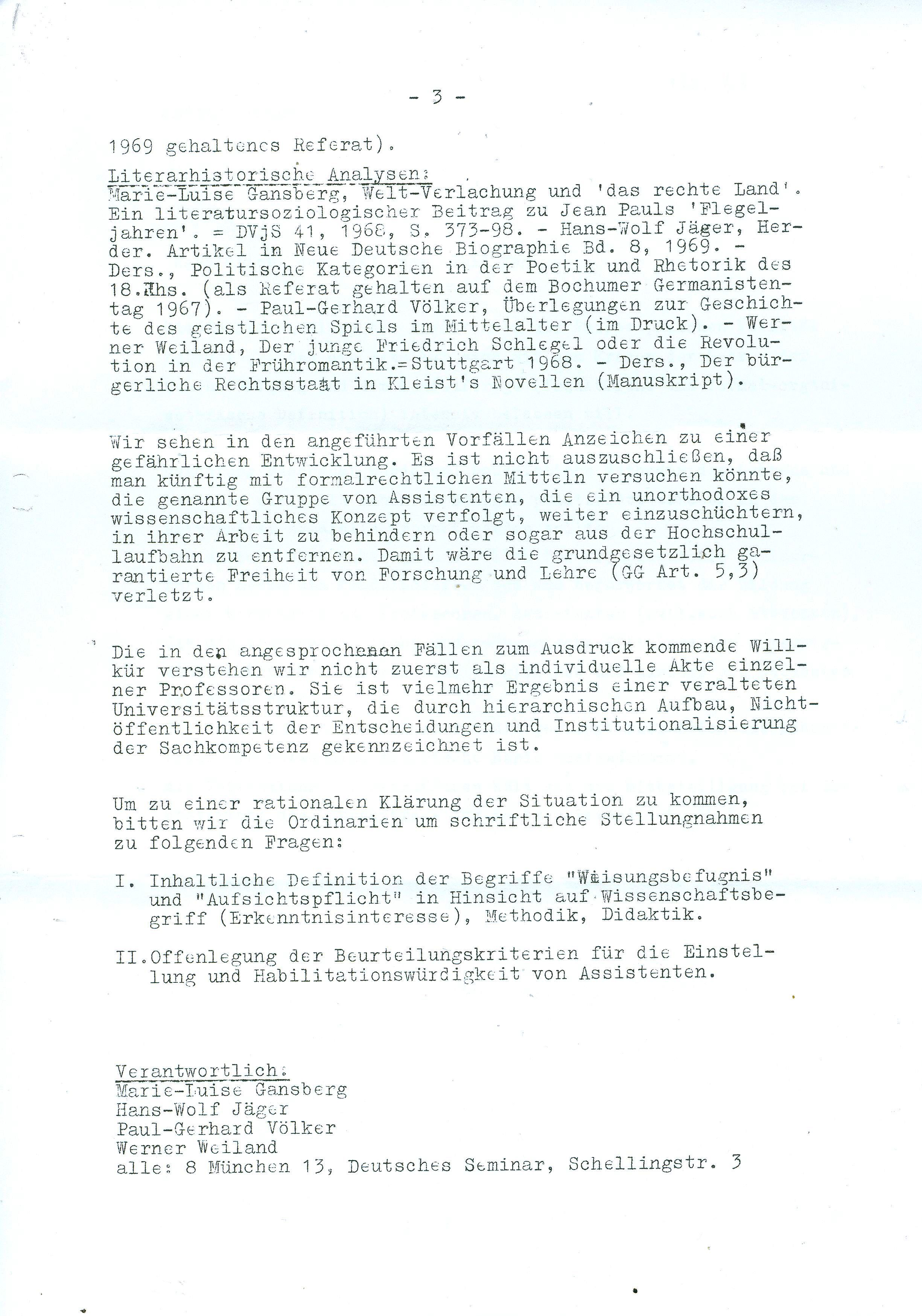 Assistenten-Flugblatt (Blatt 3), Deutsches Seminar, Universität München